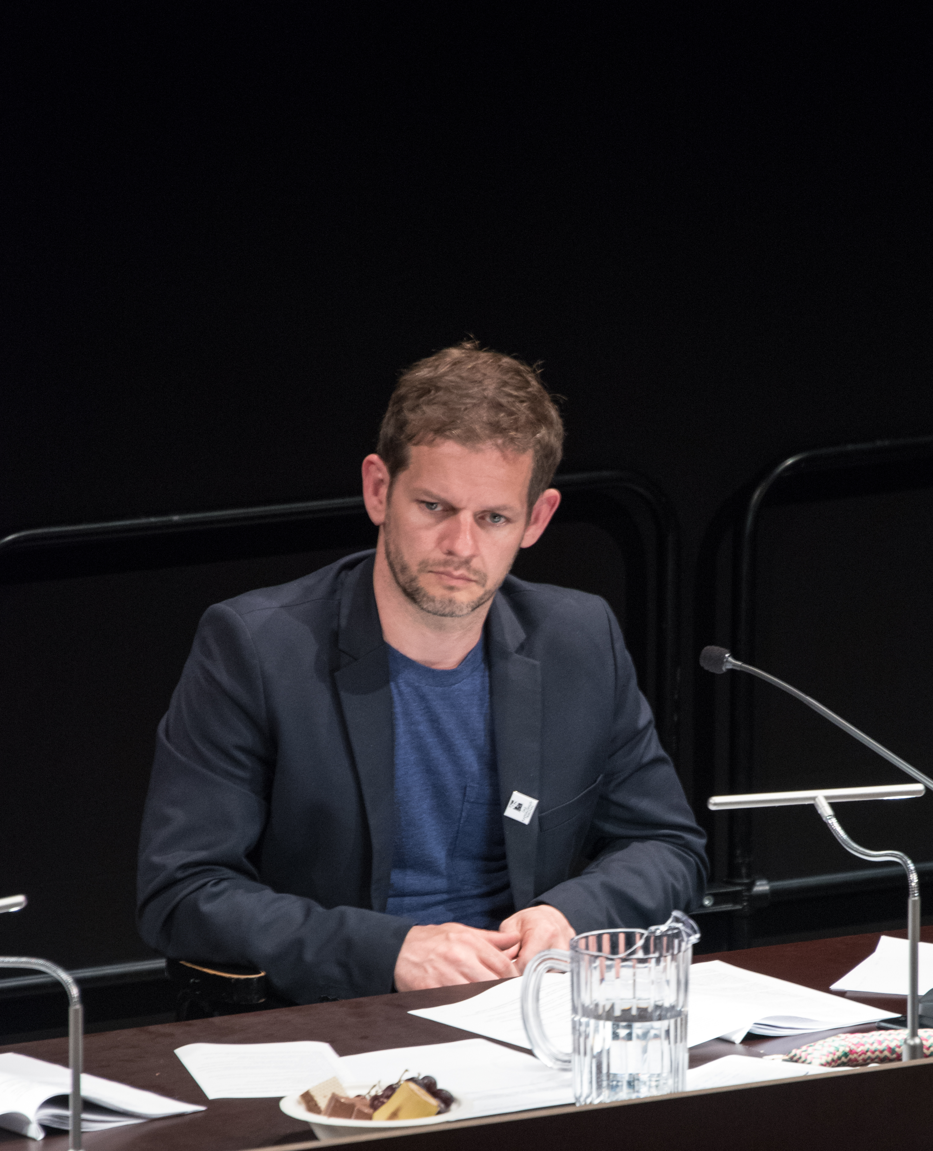 Das Kapitalismustribunal, Brut, 2016